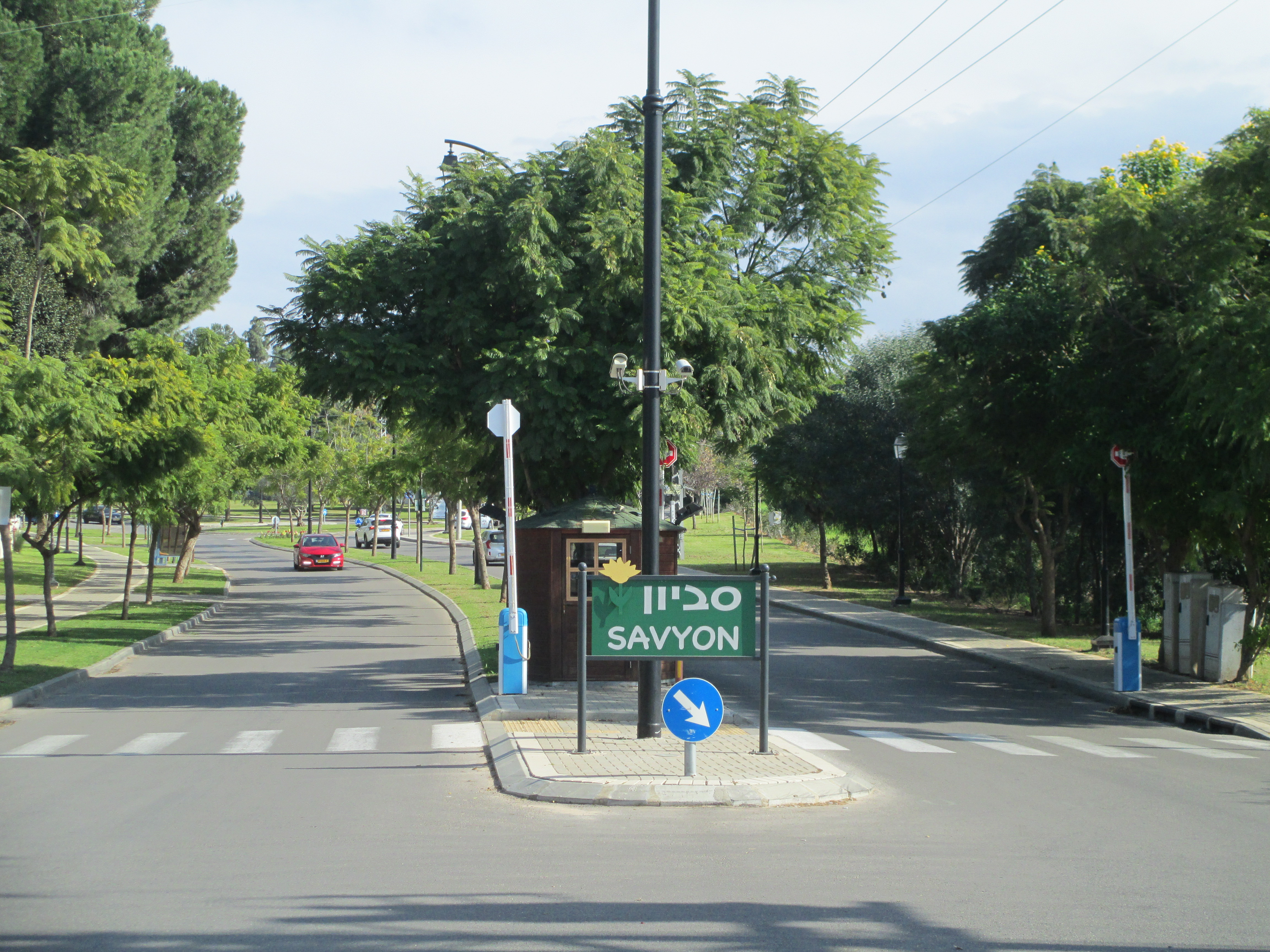 הכניסה לסביון